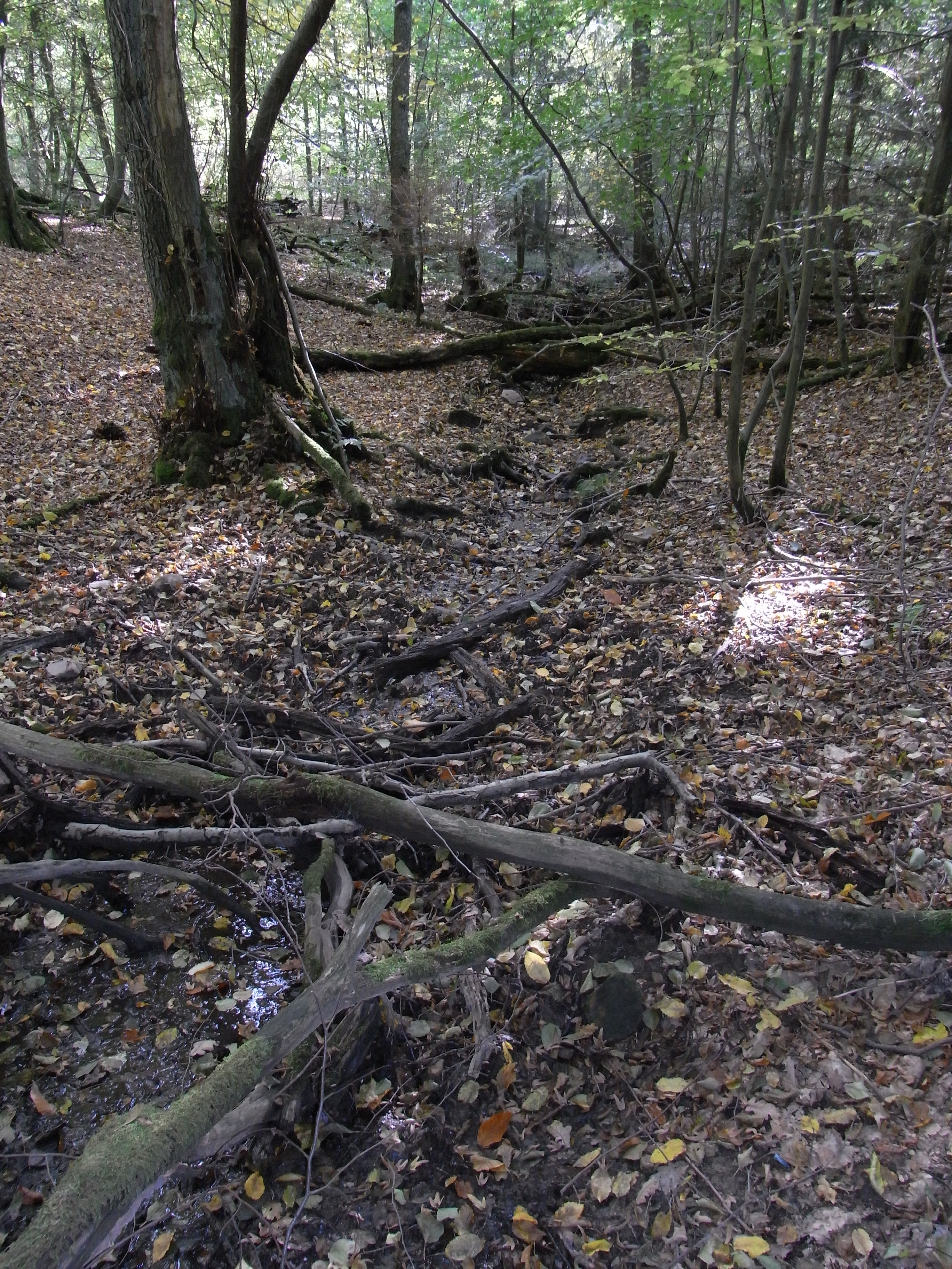 Hauptlauf des Aitzenbachs von der oberen Quelle im Laubwald unterhalb der Usinger oder Wintersteinstraße